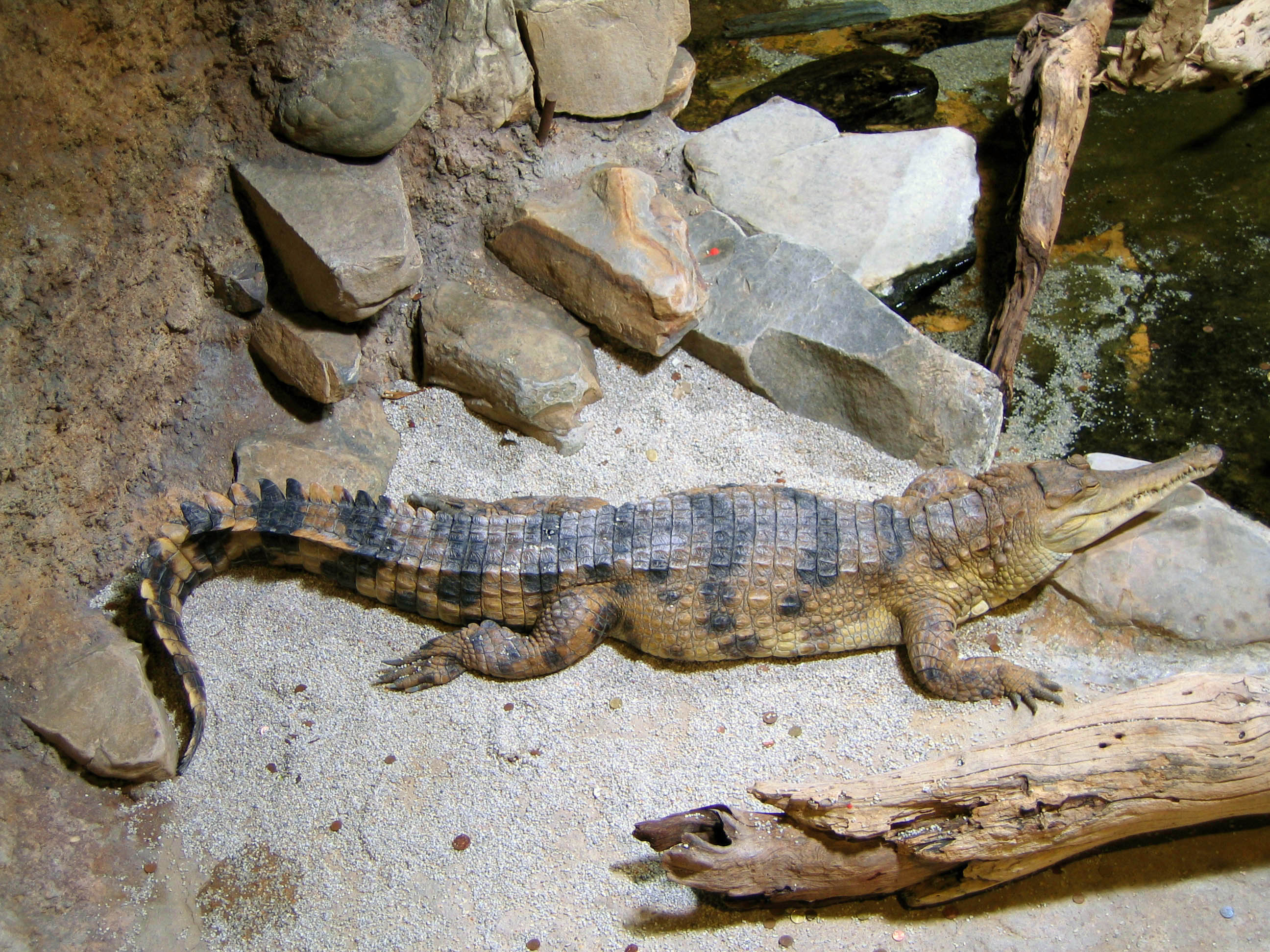 Crocodylus cataphractus, faux-gavial d'Afrique à l'aquarium de la porte dorée à Paris